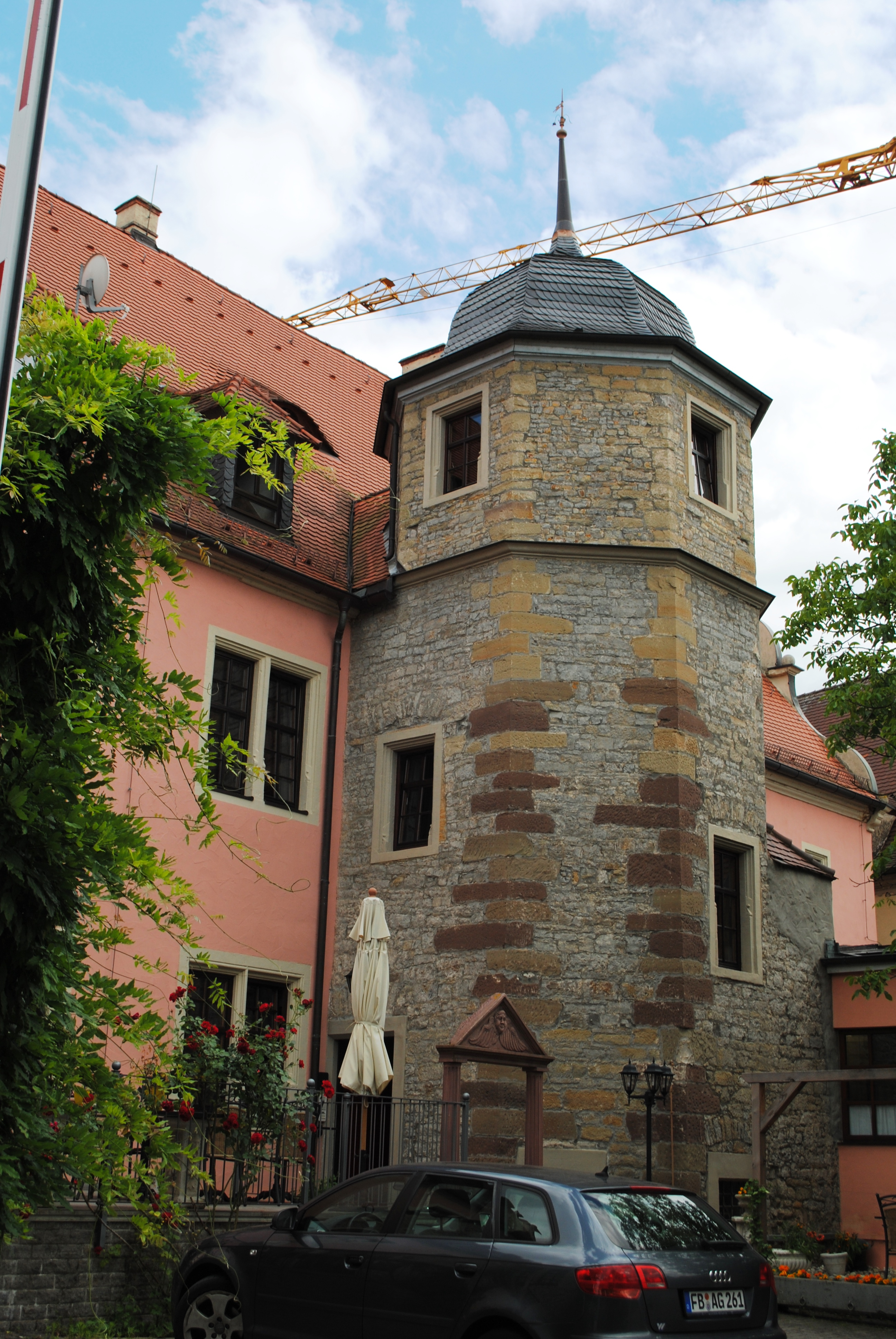 Amtshaus, Volkach, Hauptstraße 31, jetzt Hotel